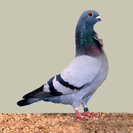 Valencian Figurita (blue bar)